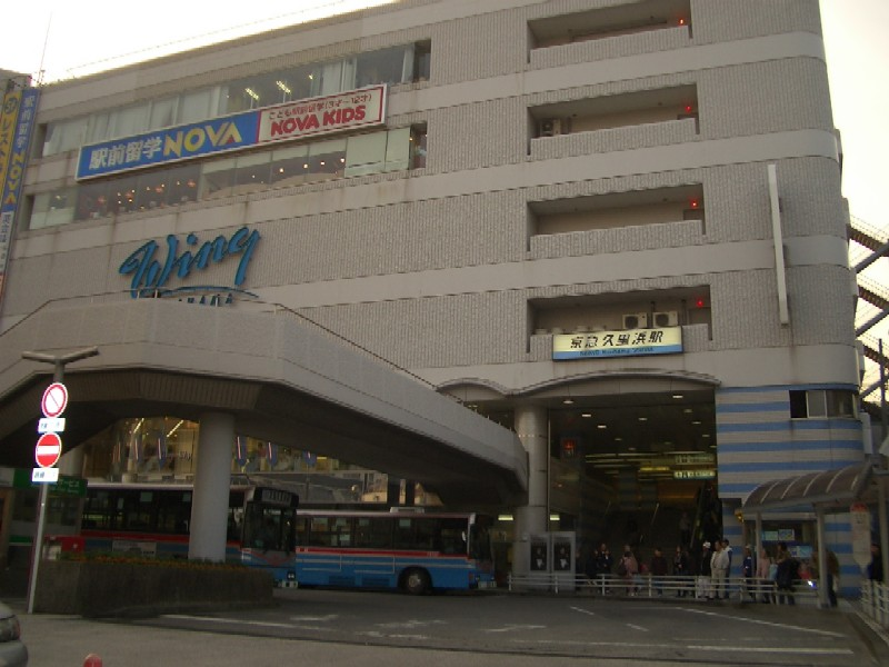 京急久里浜駅ビル。2004年11月10日、本人撮影。